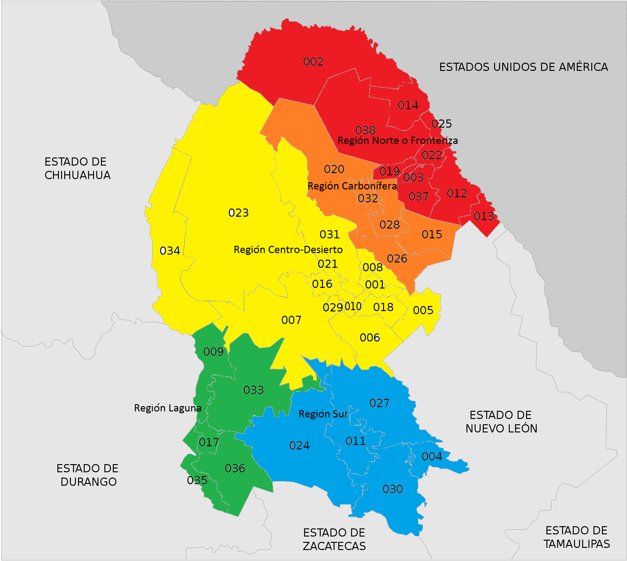 Mapa de las regiones de Coahuila, México.